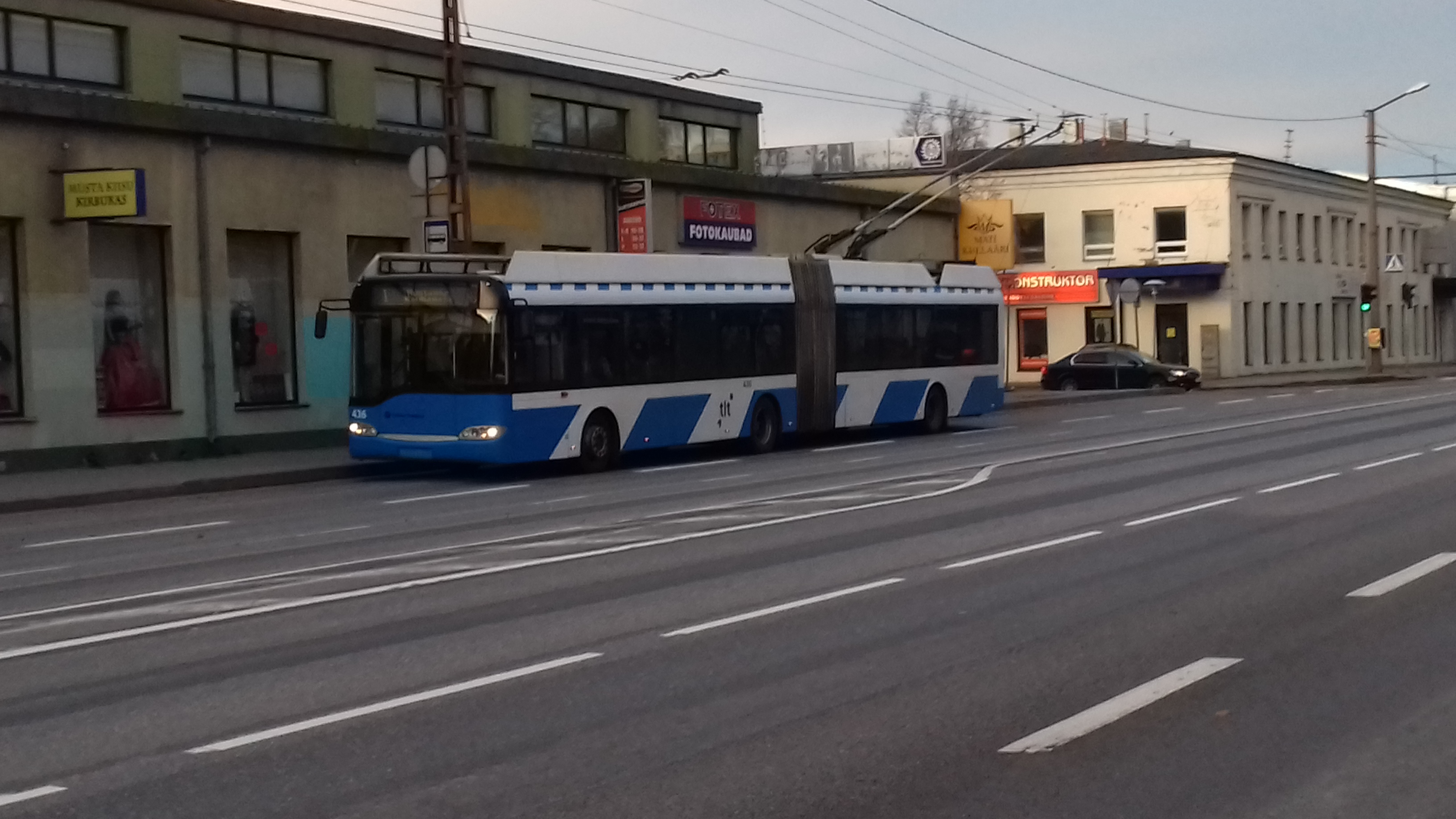 1 Trolliliin Välja peatusel Mustamäe teel